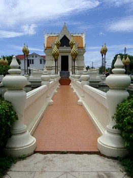 หอพระพนัสบดี